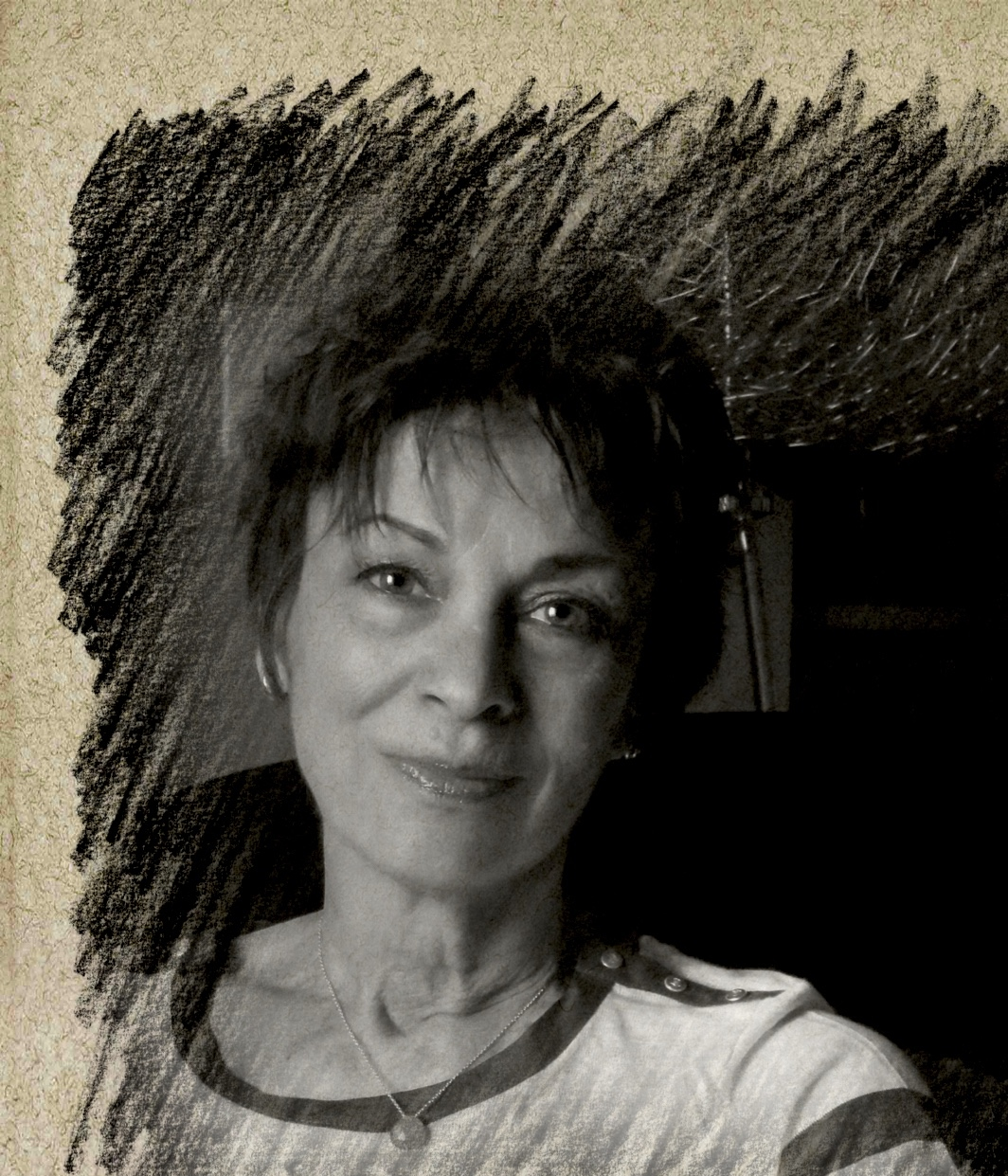 Catherine Guigon photo et dessin